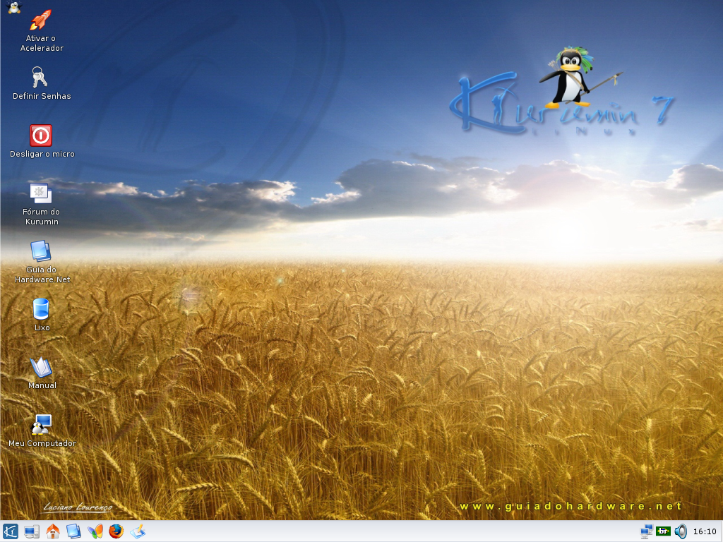 Kurumin 7.0r3, a popular Linux distribution in Brasil